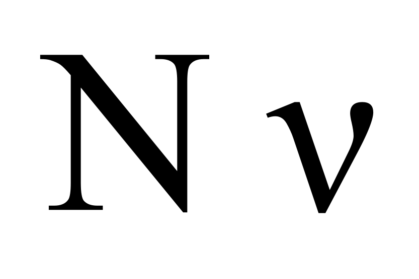 greek letter nu